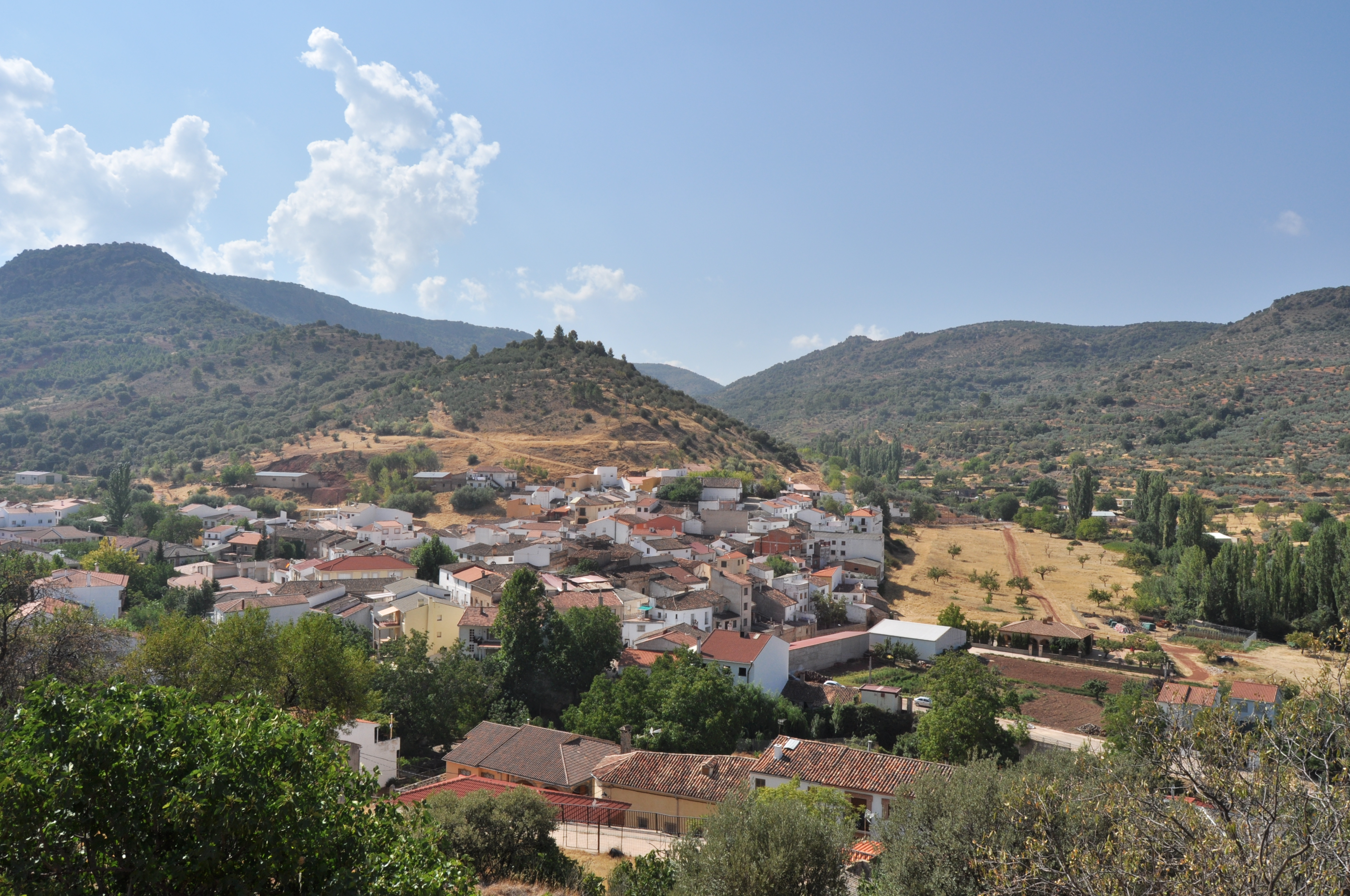 Salobre - 001